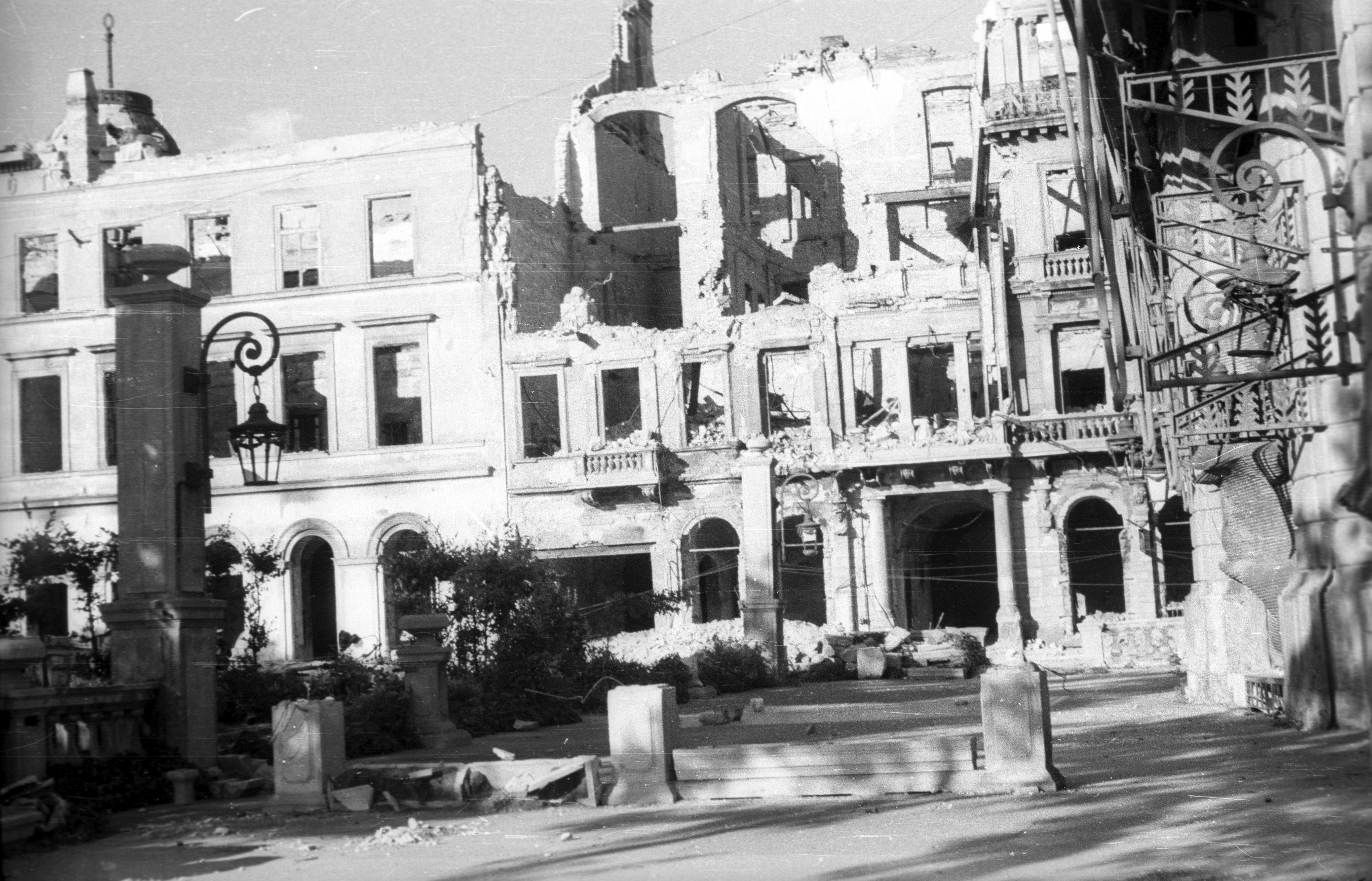 Eötvös tér. A kép a Dunapalota (korábban Ritz szálló) elől készült, az Apáczai Csere János (Mária Valéria) utca házait mutatja, a baloldali a Lloyd palota oldalról. Location: Hungary, Budapest V. Tags: damaged building, war damage, Budapest Title: Eötvös tér. A kép a Dunapalota (korábban Ritz szálló) elől készült, az Apáczai Csere János (Mária Valéria) utca házait mutatja, a baloldali a Lloyd palota oldalról.